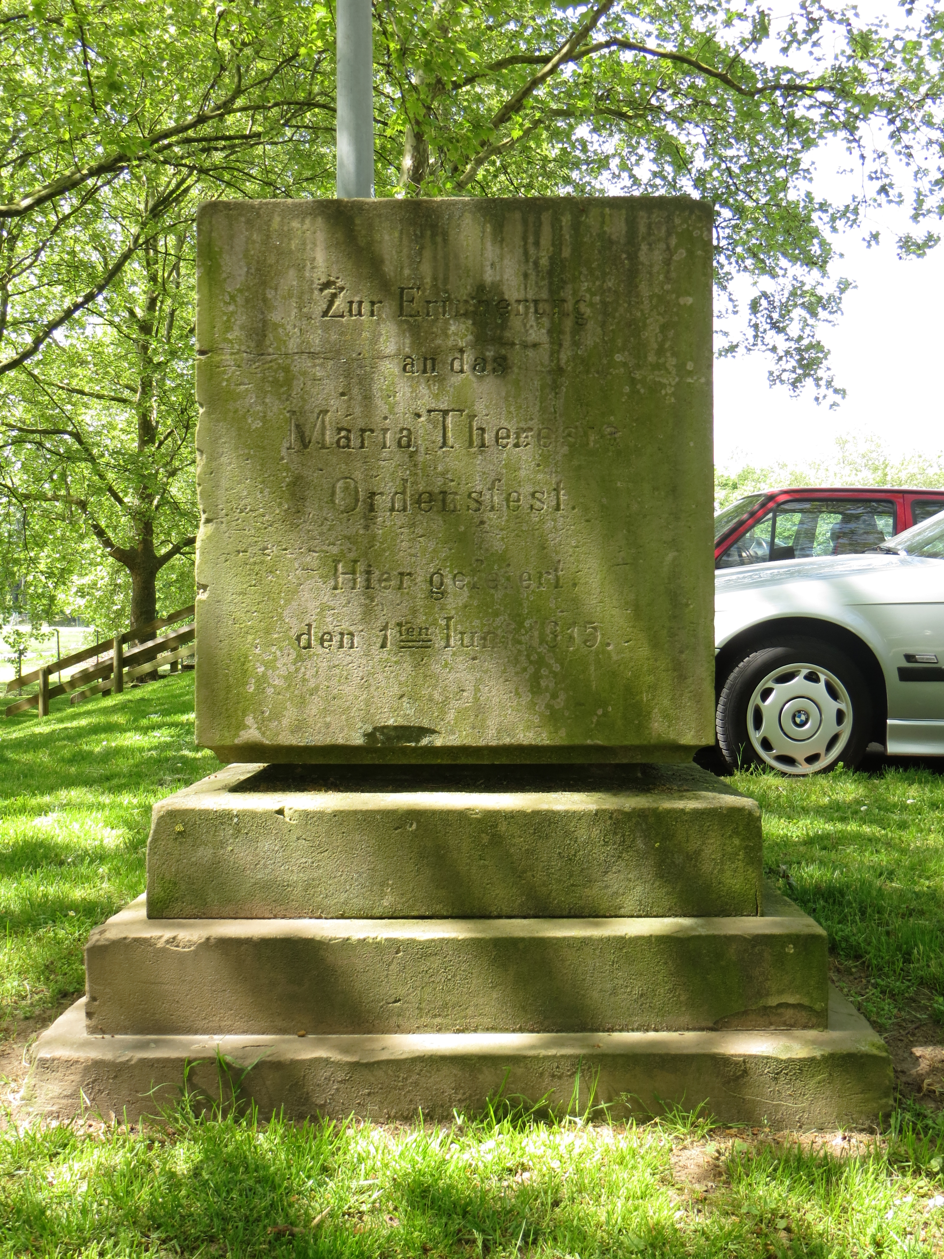 Gedenkstein in der Nähe der Heilbronner Theresienwiese, der an das dort am 1. Juni 1815 abgehaltene Maria-Theresia-Ordensfest erinnert. Kopie des originale Steins von 1953 oder später